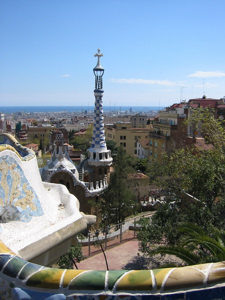 Vista del parque y la ciudad desde el mirador del Parc Güell, Barcelona